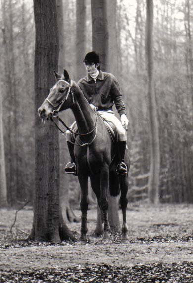 Kimono (pur-sang belge) et son propriétaire. Sur cette photo le cheval porte une martingale à anneaux, et, la selle du cavalier, des étriers compensés.